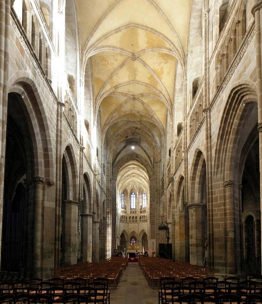 Nef de la cathédrale Saint-Tugdual de Tréguier (22). .